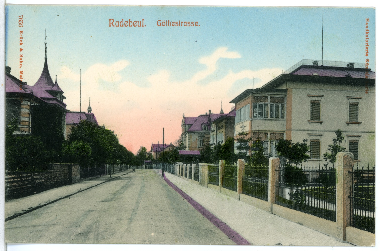 Radebeul; Goethestraße This postcard is from publisher Brück & Sohn in Meißen ( postcard has a unique number 07656 and is available in a higher resolution at the publisher. This images was uploaded in a cooperation project between Wikipedians and the publisher.